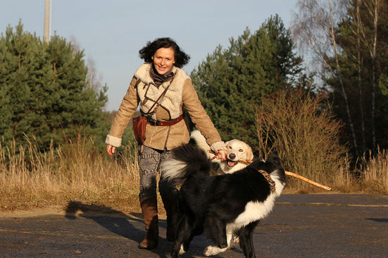 Maike Maja Nowak beim Dreh für das ZDF